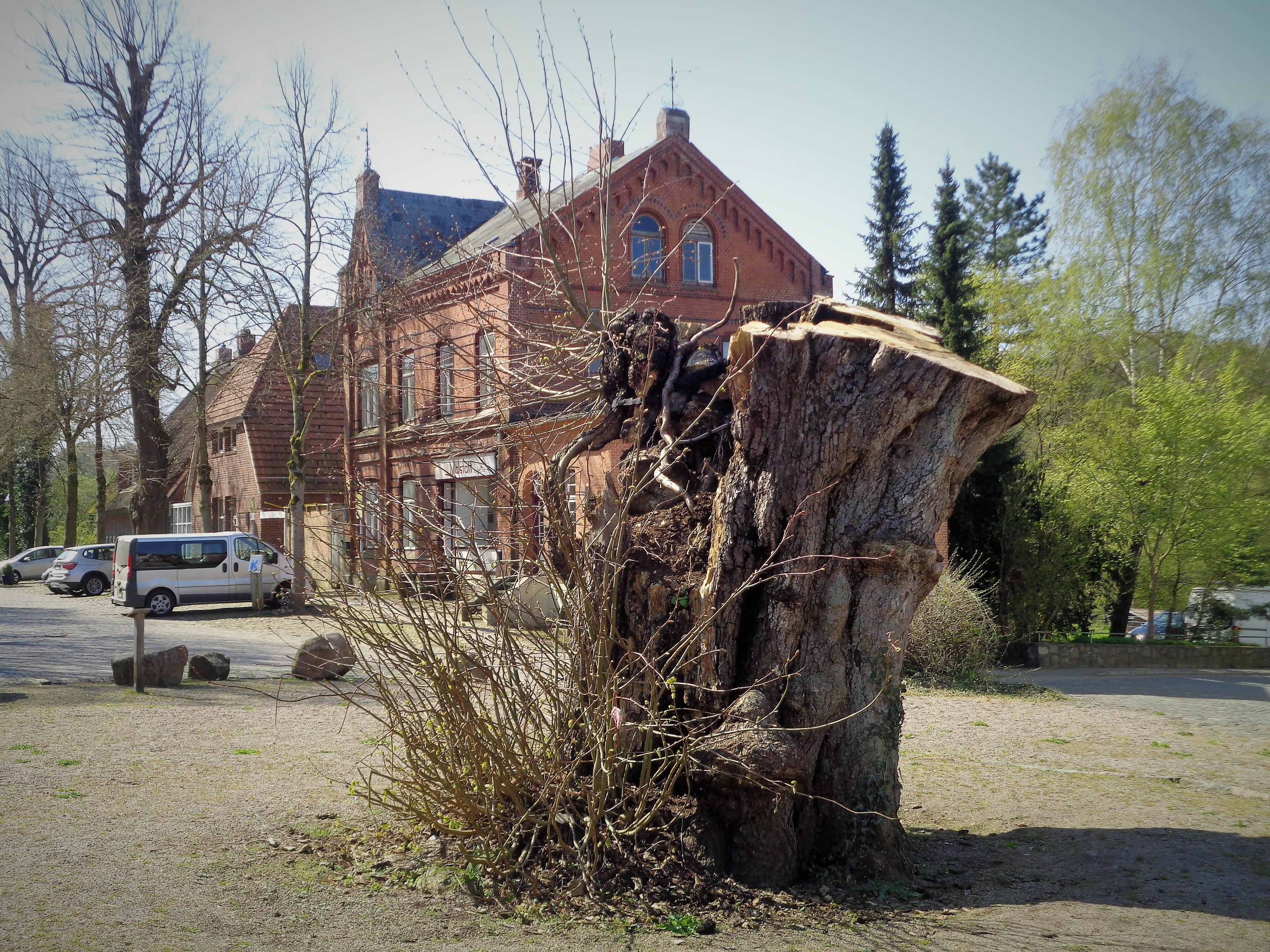 Die Überreste der Bordesholmer Gerichtslinde.